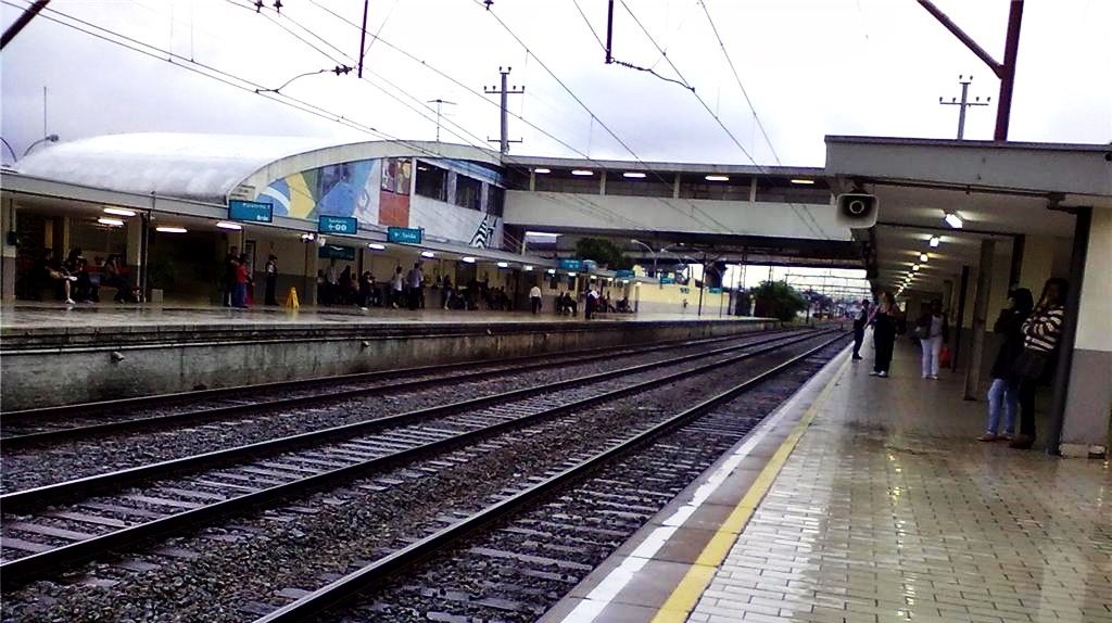 Plataformas da Estação Ipiranga, em São Paulo durante uma garoa. Linha 10 da CPTM